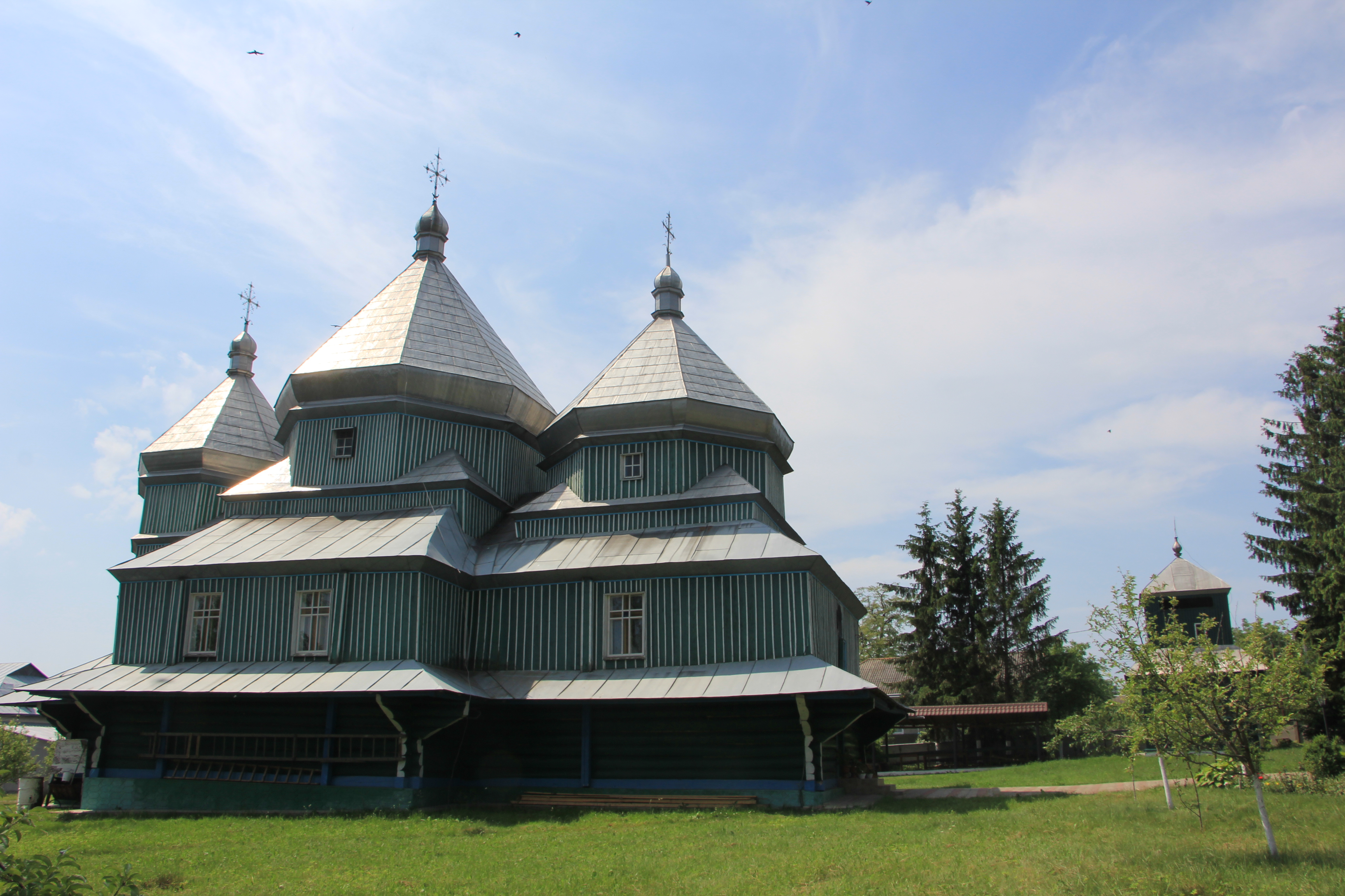 Дерев'яна церква Церква Богородиці 1884 с. Шишківці Кіцманського району